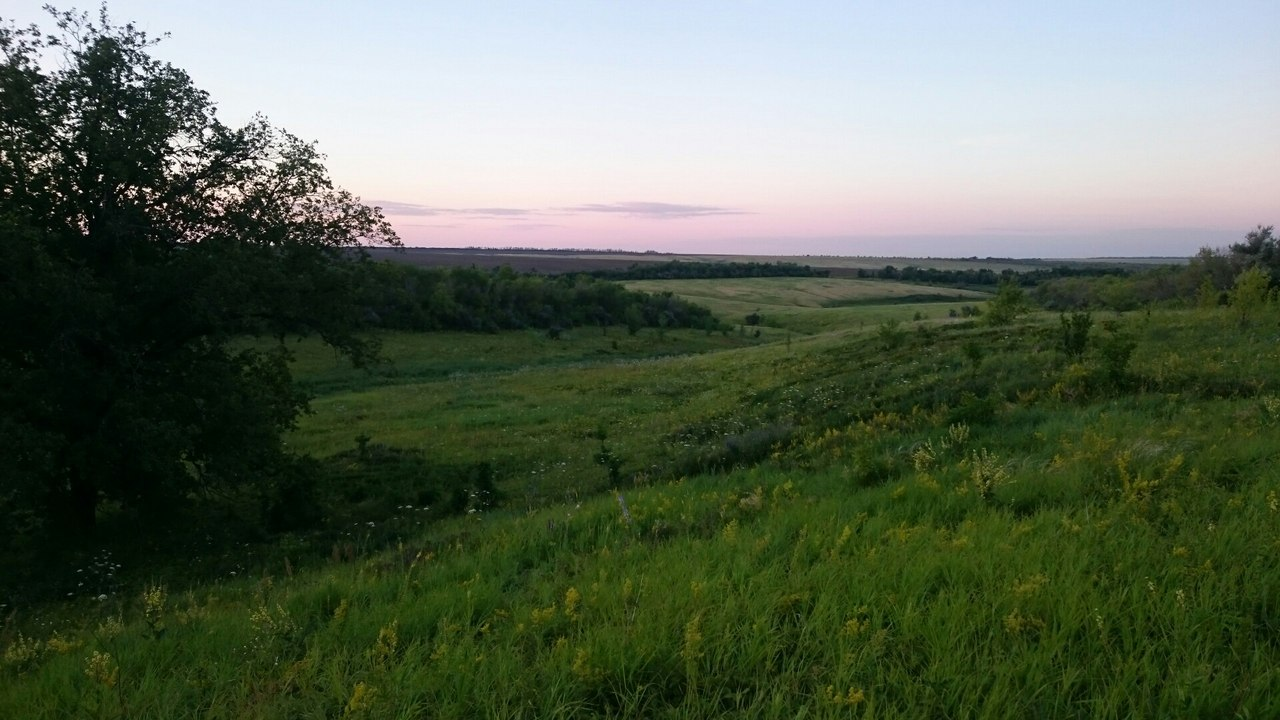 Памятник природы регионального значение колок "Дубовенький". с.Большая Дергуновка, Самарской области.